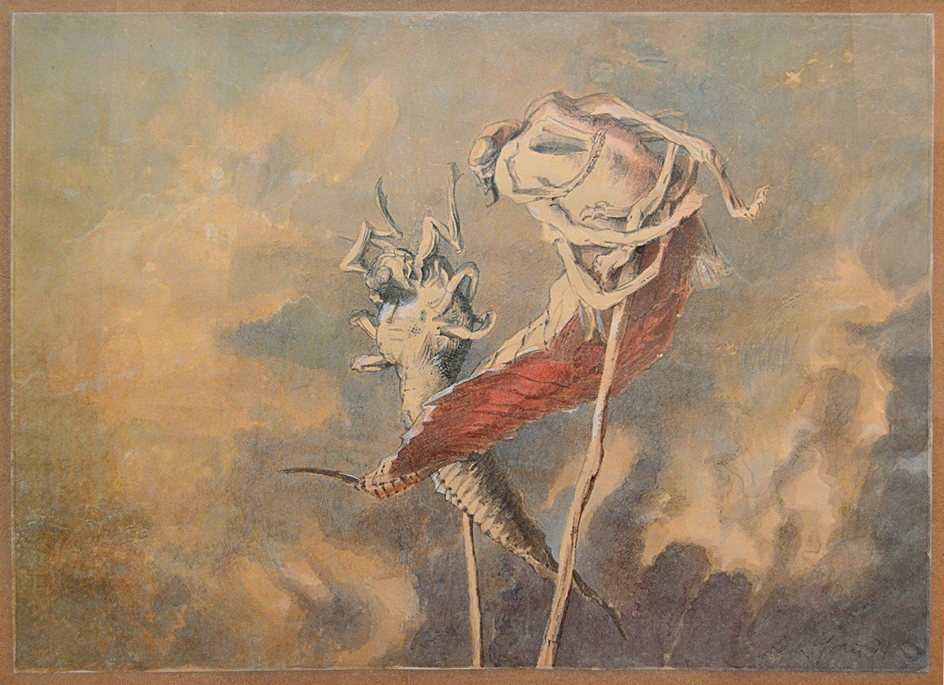 Schichtaquarell von Prof. Peter Grau, 1977